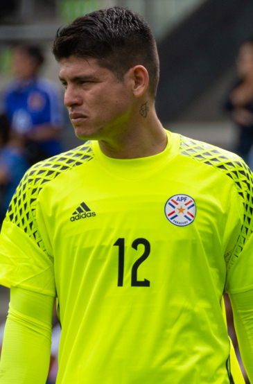 Alfredo Aguilar